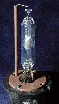 PKW Xenon-Bogenlampe